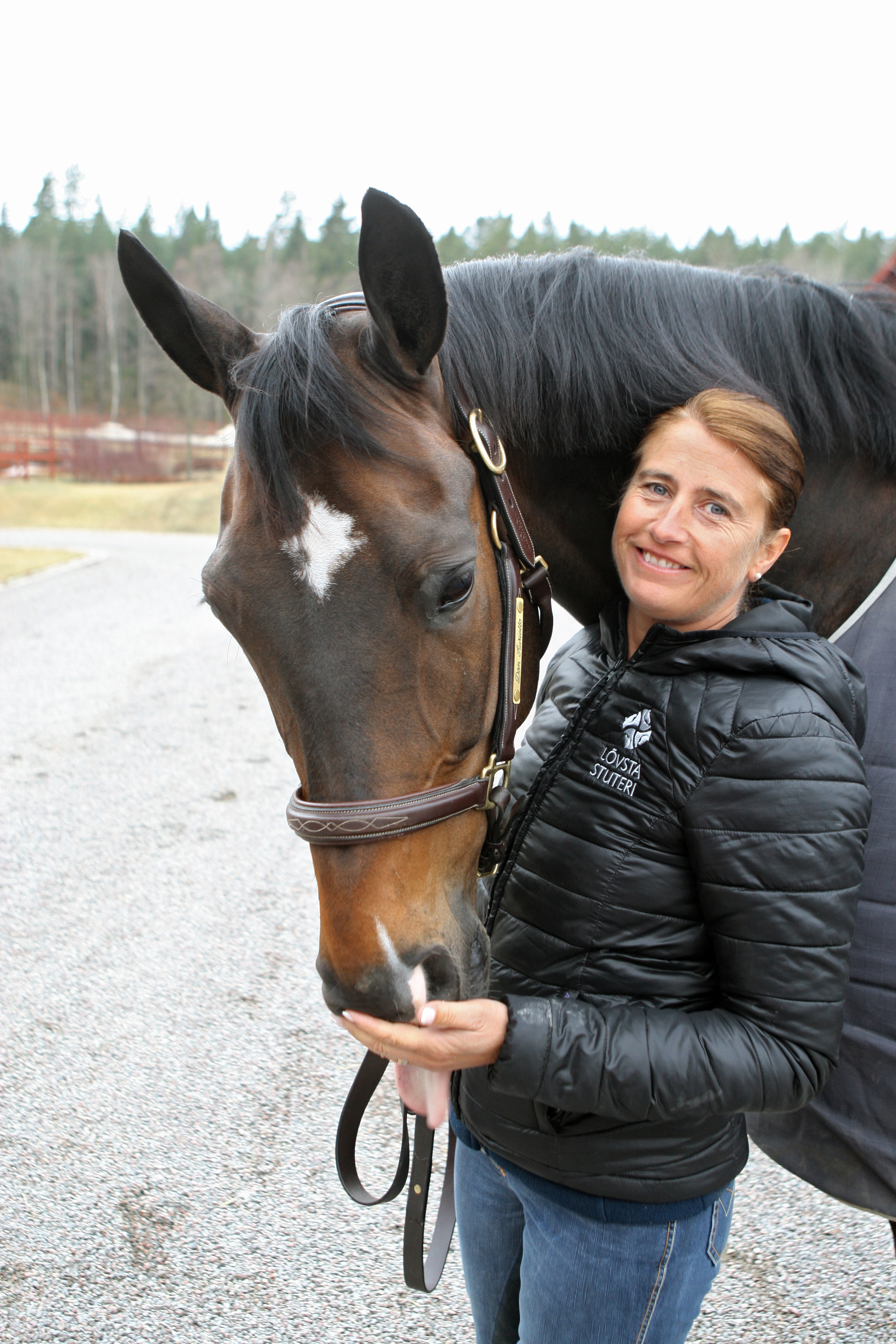 Dressyrryttaren Tinne Vilhelmson Silfvén med hästen Don Auriello på Lövsta Stuteri, Upplands Väsby.